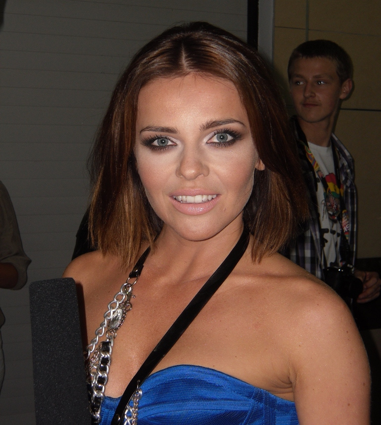 Edyta Herbuś. Zdjęcie zrobione podczas Eska Music Awards 2011 w katowickim Spodku.